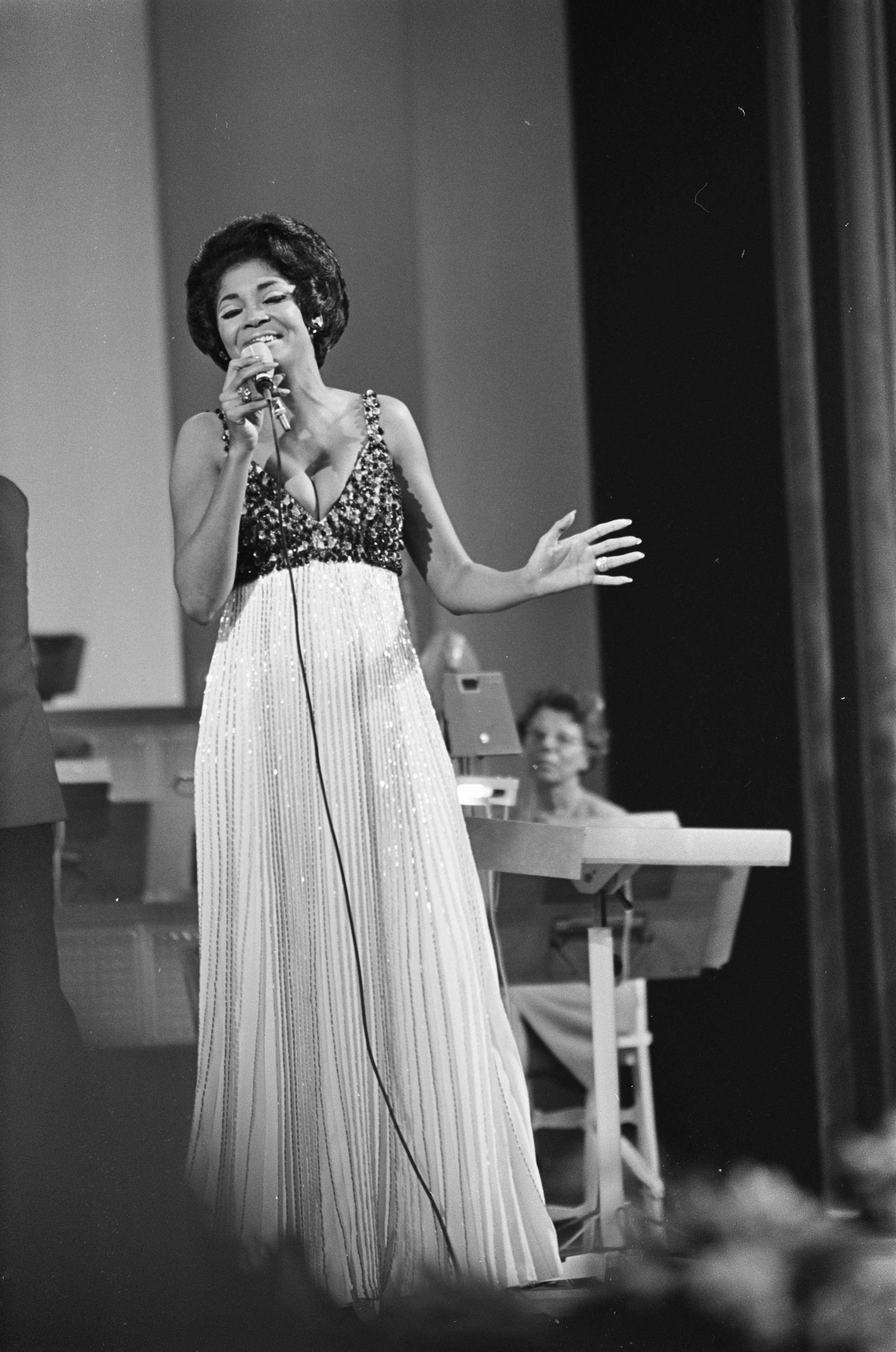 Collectie / Archief : Fotocollectie Anefo Reportage / Serie : Grand Gala du Disque 1968 Beschrijving : Grand Gala du Disque in de RAI .Nancy Wilson Datum : 8 maart 1968 Locatie : Amsterdam Trefwoorden : zangers Persoonsnaam : Wilson, Nancy Fotograaf : Kroon, Ron / Anefo Auteursrechthebbende : Nationaal Archief Materiaalsoort : Negatief (zwart/wit) Nummer archiefinventaris : bekijk toegang 2.24.01.05 Bestanddeelnummer : 921-1492